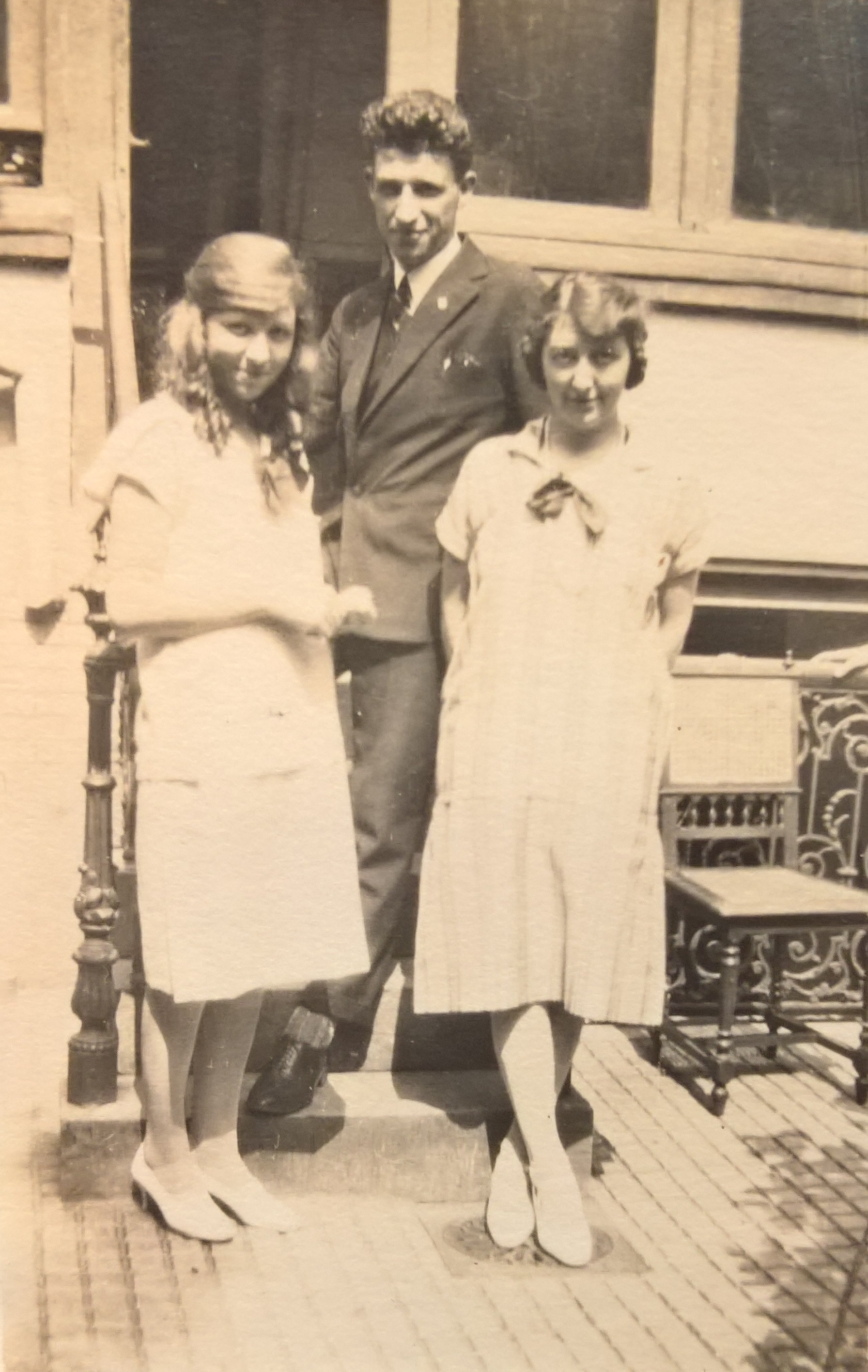 Ferdinand Vercnocke met zussen te Oostende ca 1928